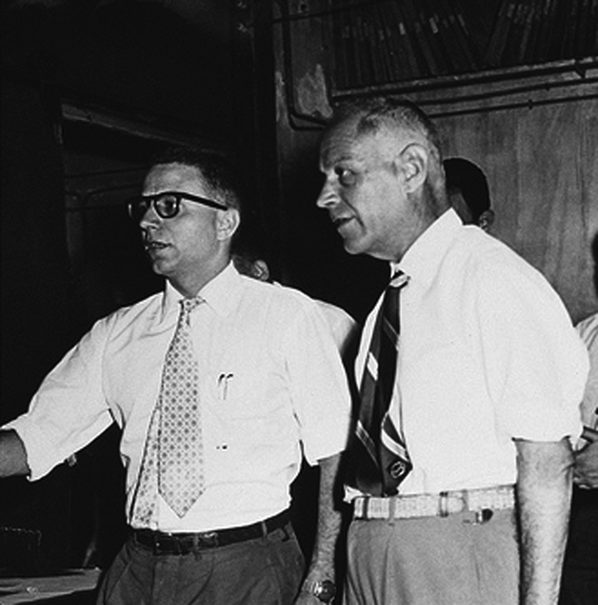 Víctor Seix Perarnau i el seu pare Joan Seix Miralta, director general i president, d'I.G. Seix i barral Hems, S.A.(final dels anys 60)